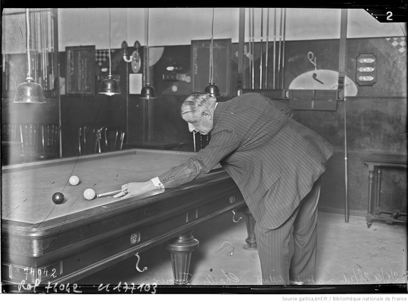 Charles Faroux bei der Cadre-45/2-Weltmeisterschaft 1922 in Paris